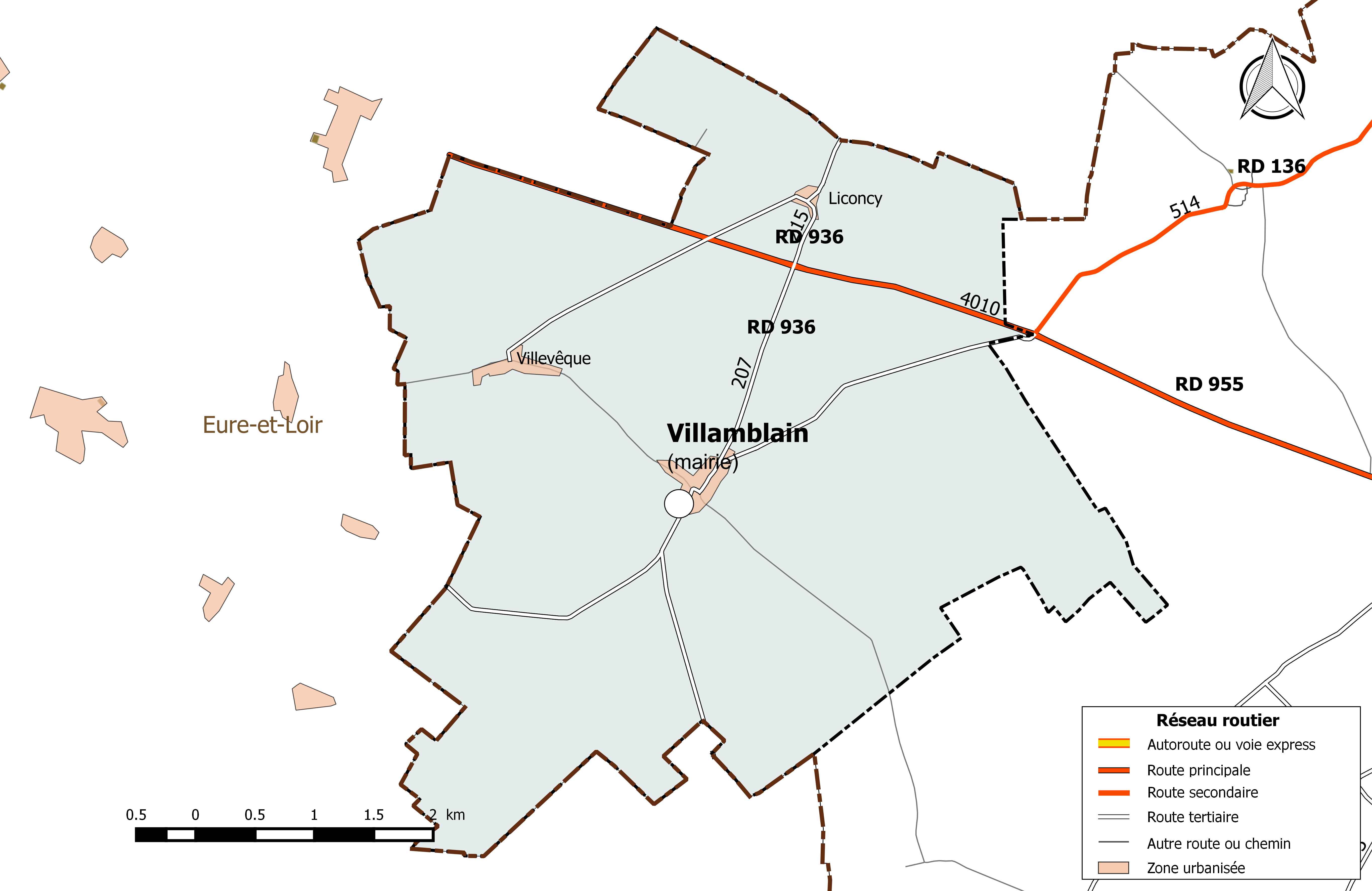 Carte du réseau routier de la commune de Villamblain.